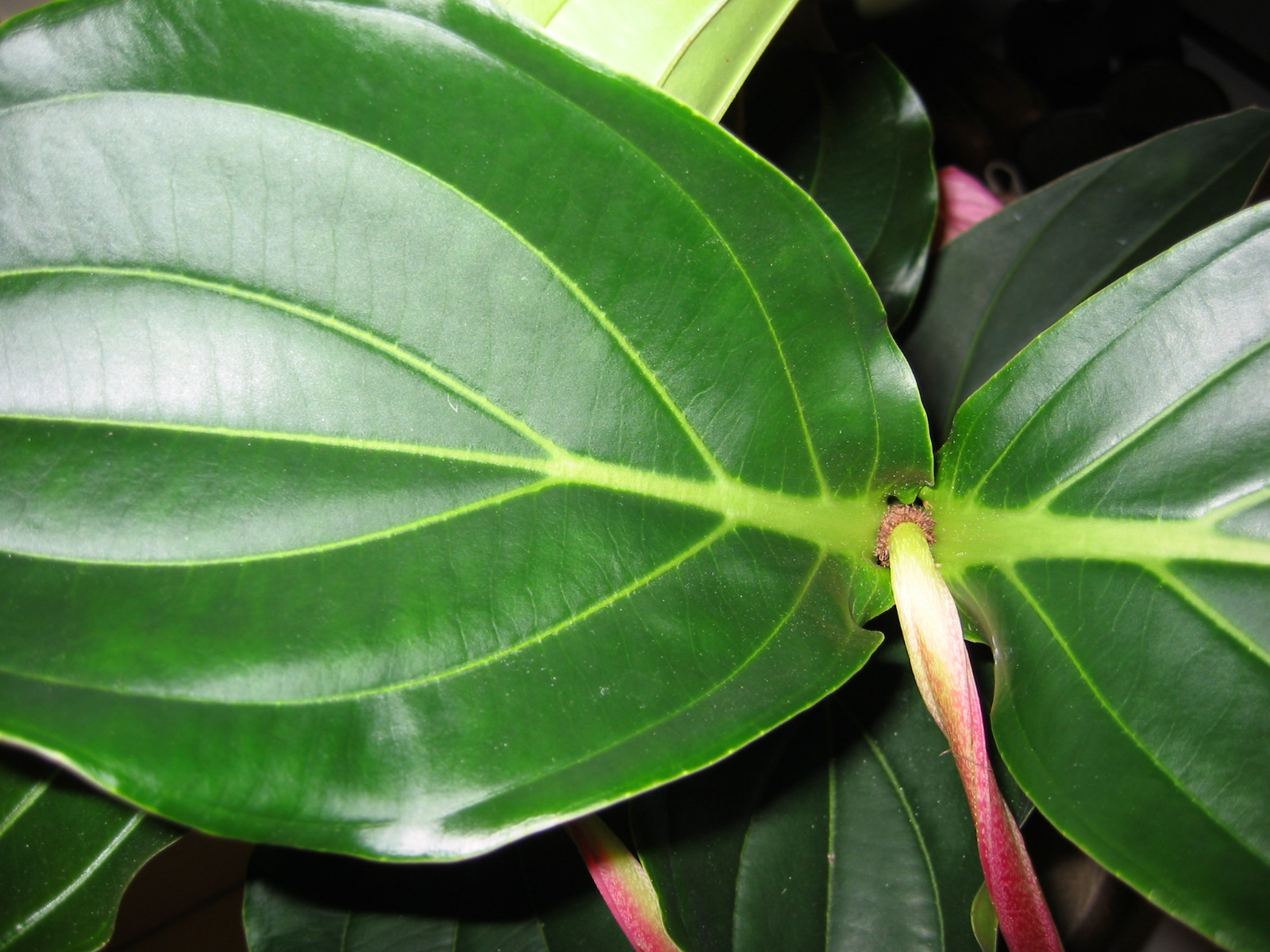 Medinilla magnifica Blütenstiel an der Blattachsel